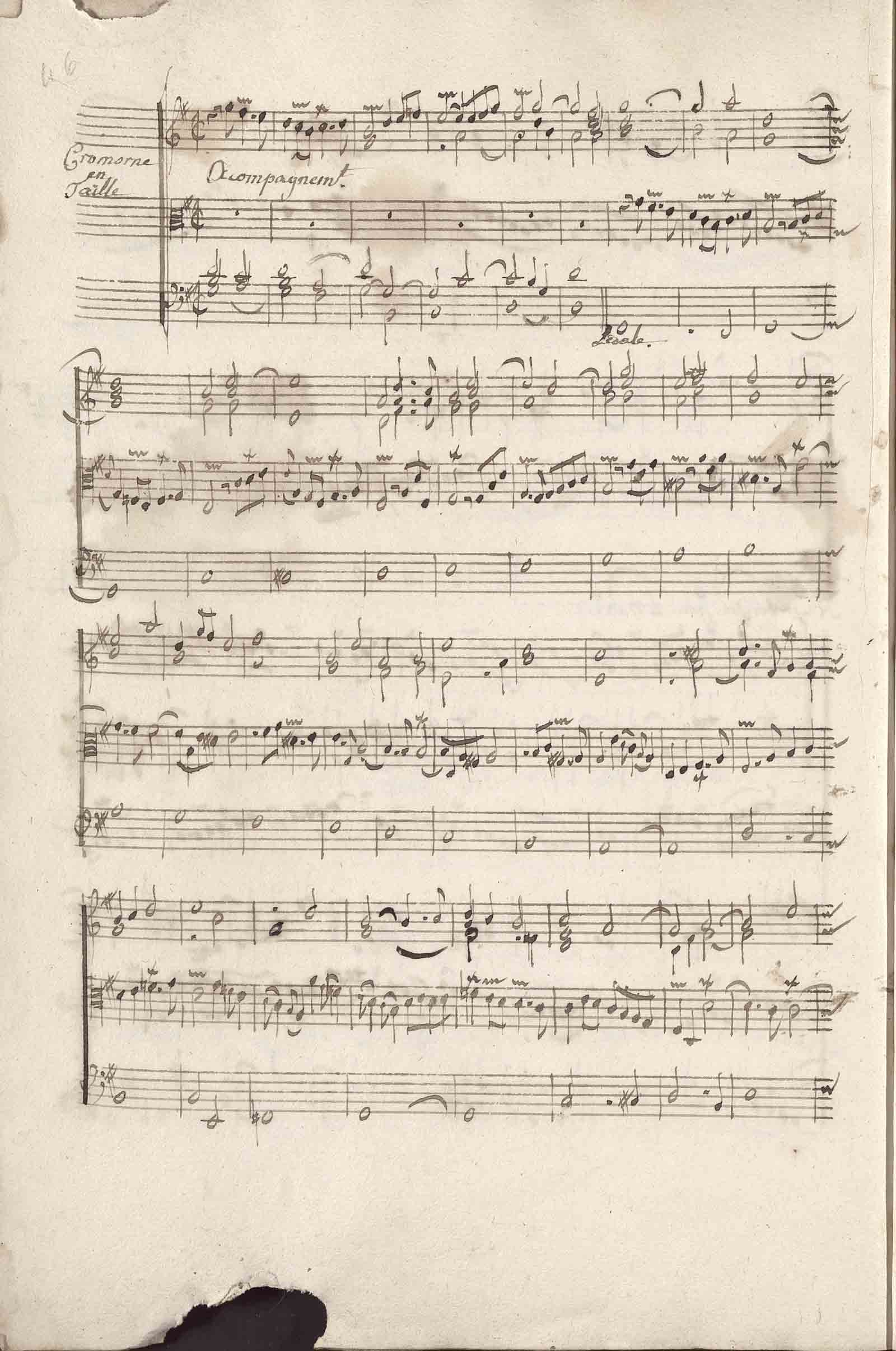 Livre d'orgue manuscrit du XVIIIe siècle fait à Limoges